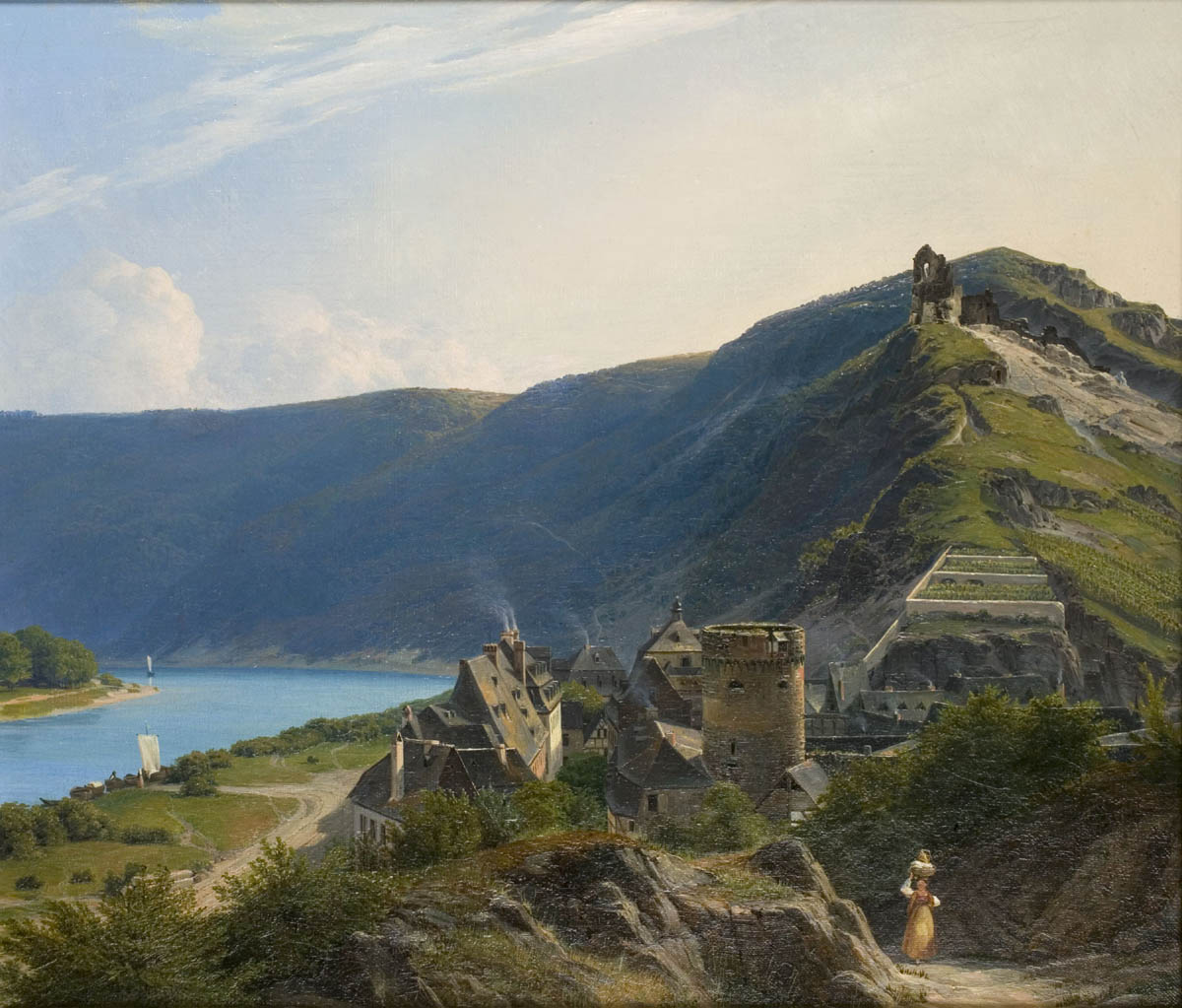 Burg Eltz mit der Ruine Trutz Eltz